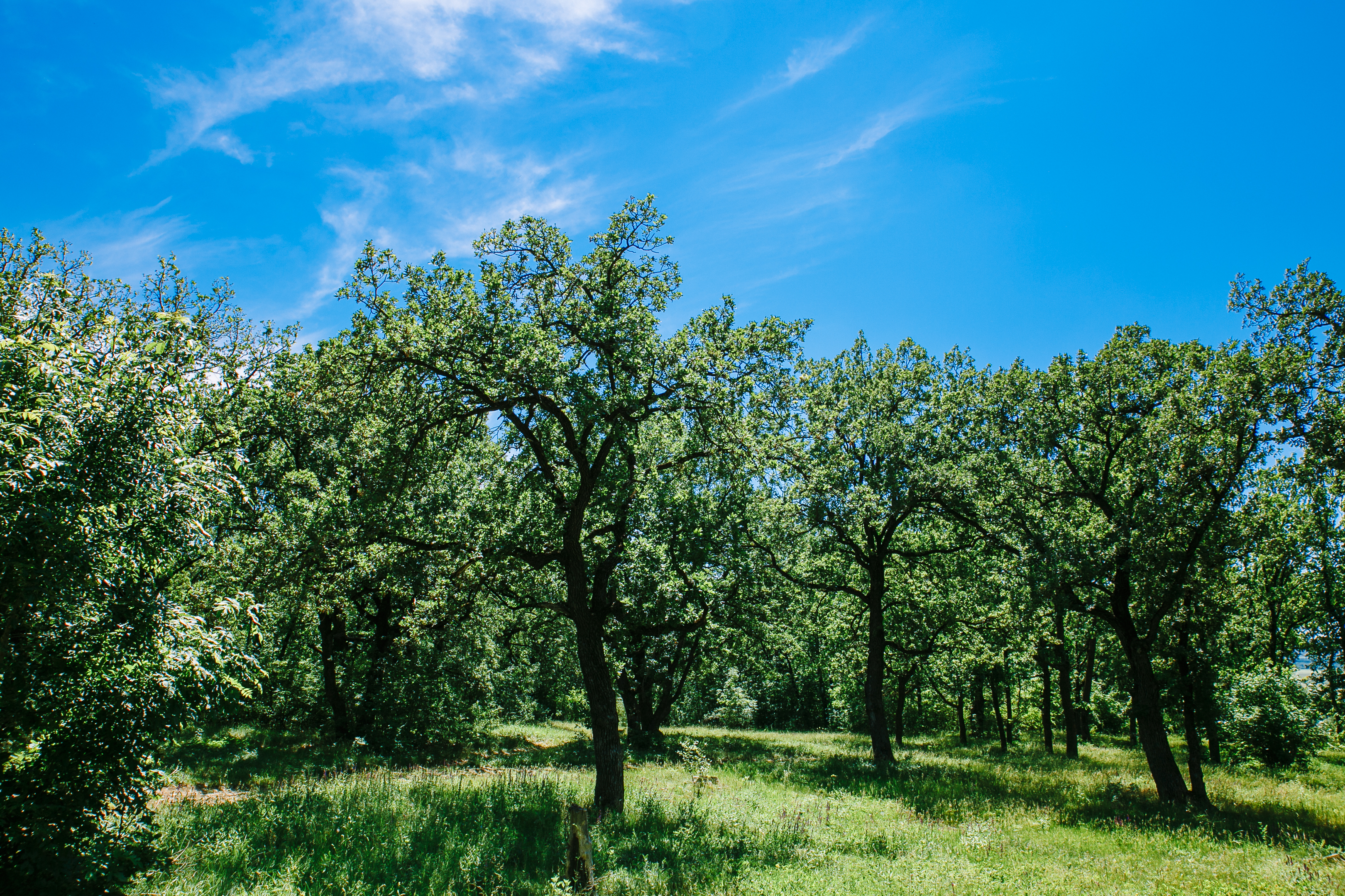 Călineștii Mici, monument al naturii amplasat în raionul Fălești, la est de satul Călinești, ocolul silvic Călinești, Călineștii Mici, parcela 46, subparcela 4 (cod MD-FL-mn.Ca-011) Ca-011